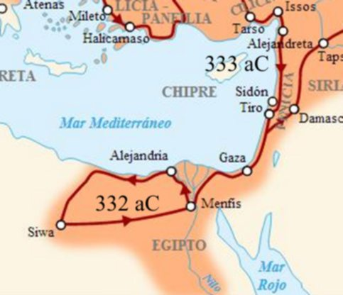 Mapa Zoom sobre la 2º etapa de las conquistas de Alejandro Magno, Asia Menor y Egipto. Alexander The Great battles and campaigns, rutes